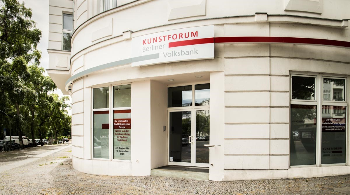 Eingang zum Kunstforum der Berliner Volksbank am Kaiserdamm 105 in Berlin